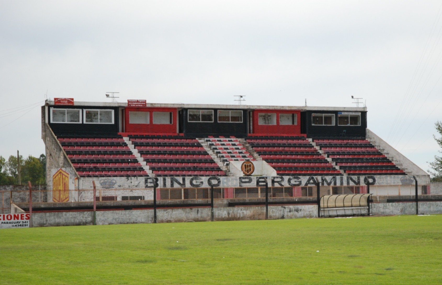 Estadio "Miguel Morales" del Club Atlético Douglas haig de Pergamino, provincia de Buenos Aires, Argentina